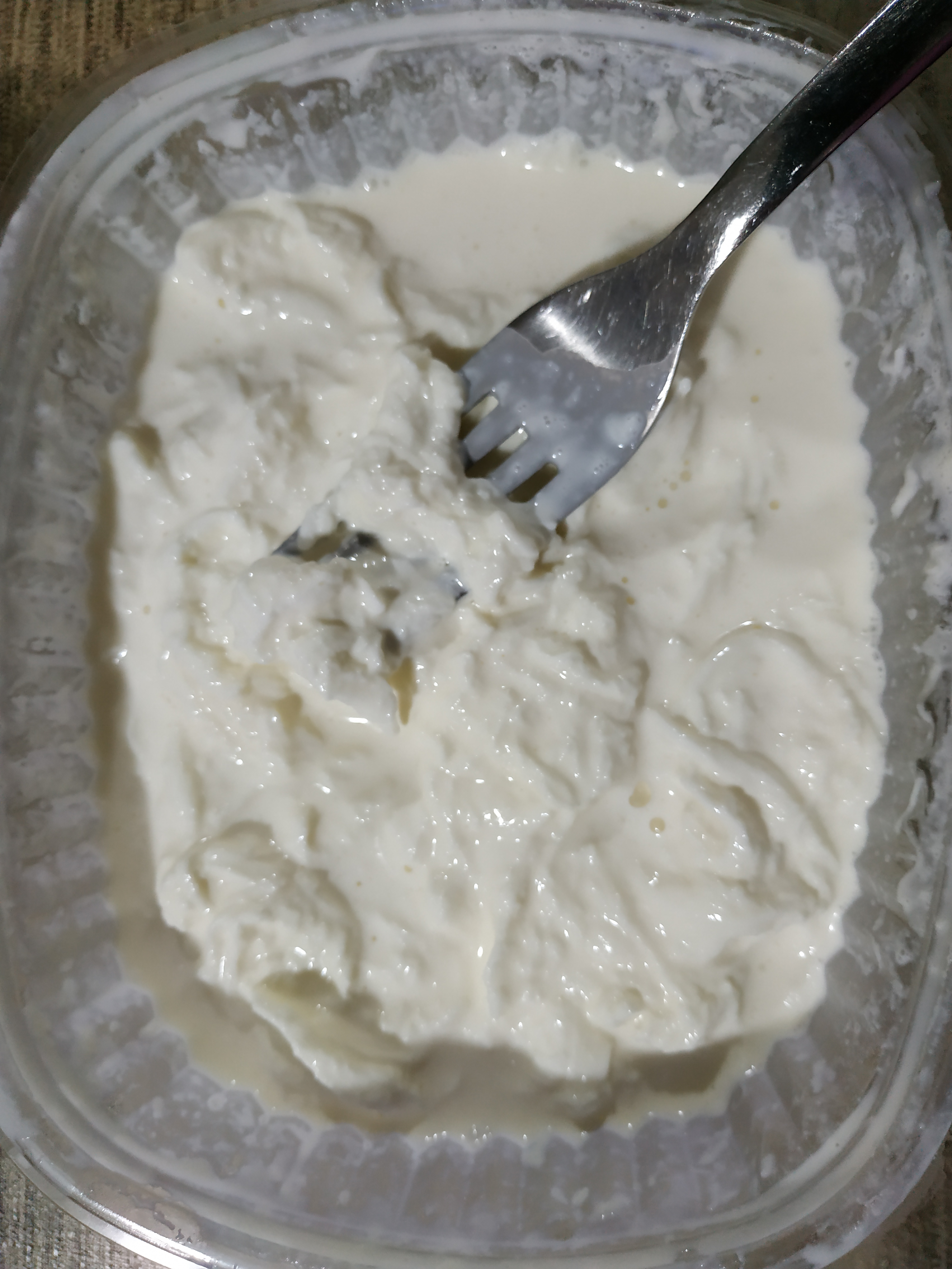 Ciotola di stracciatella